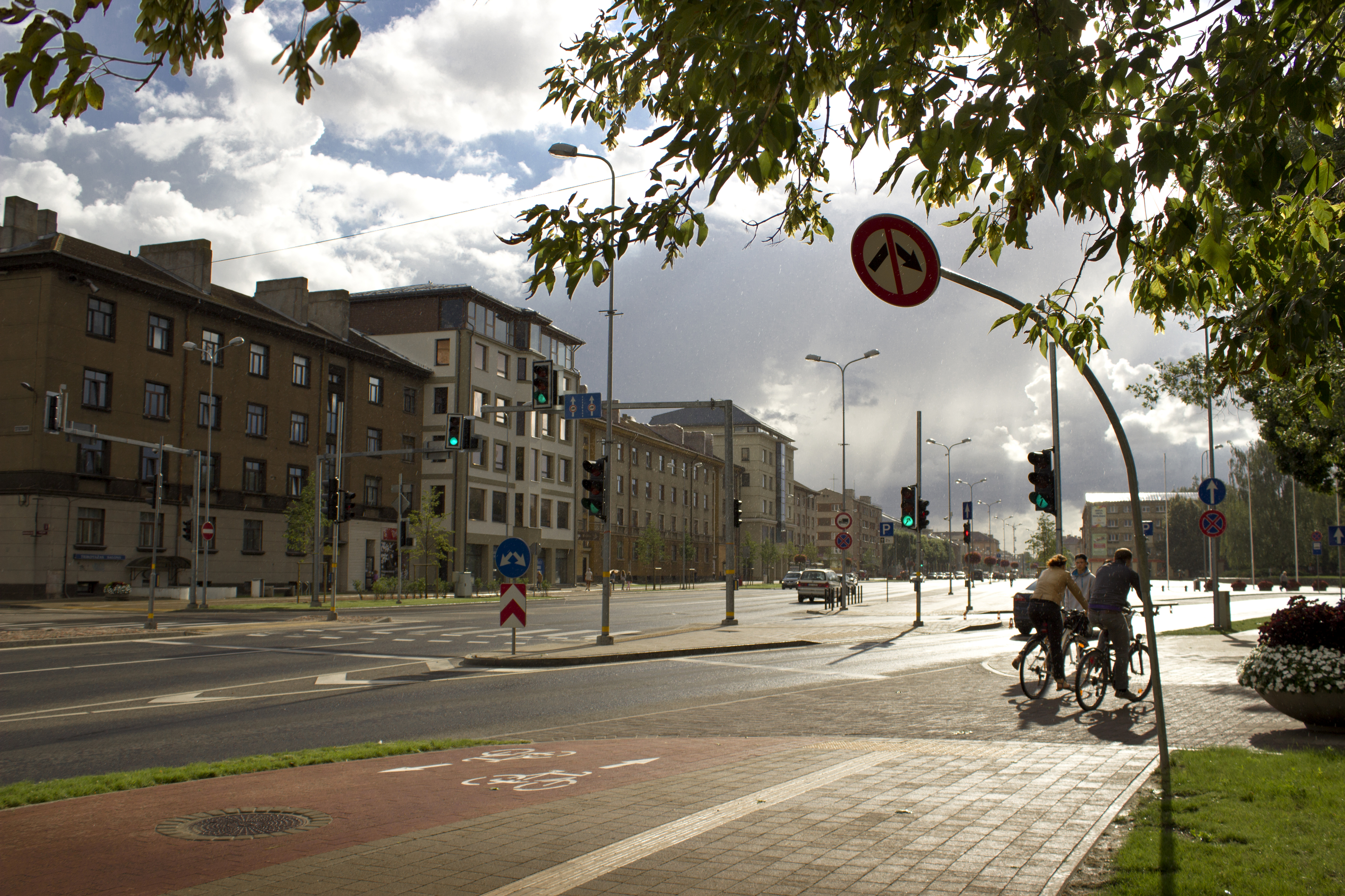 Jelgava